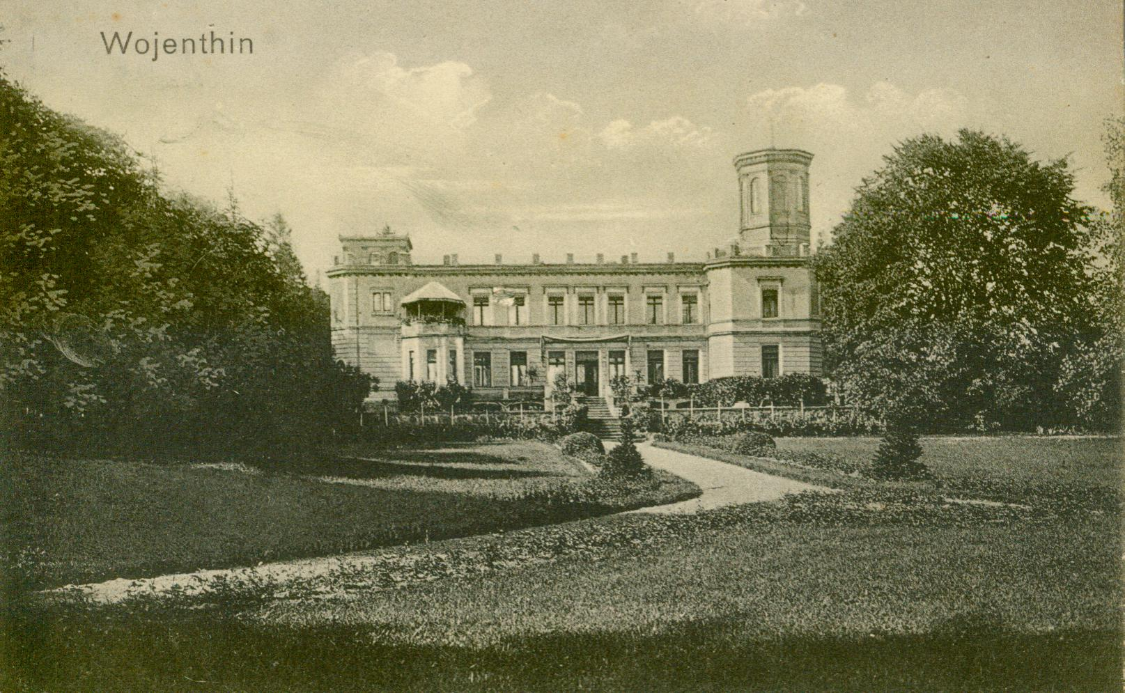 Schloss Wojenthin, Pommern